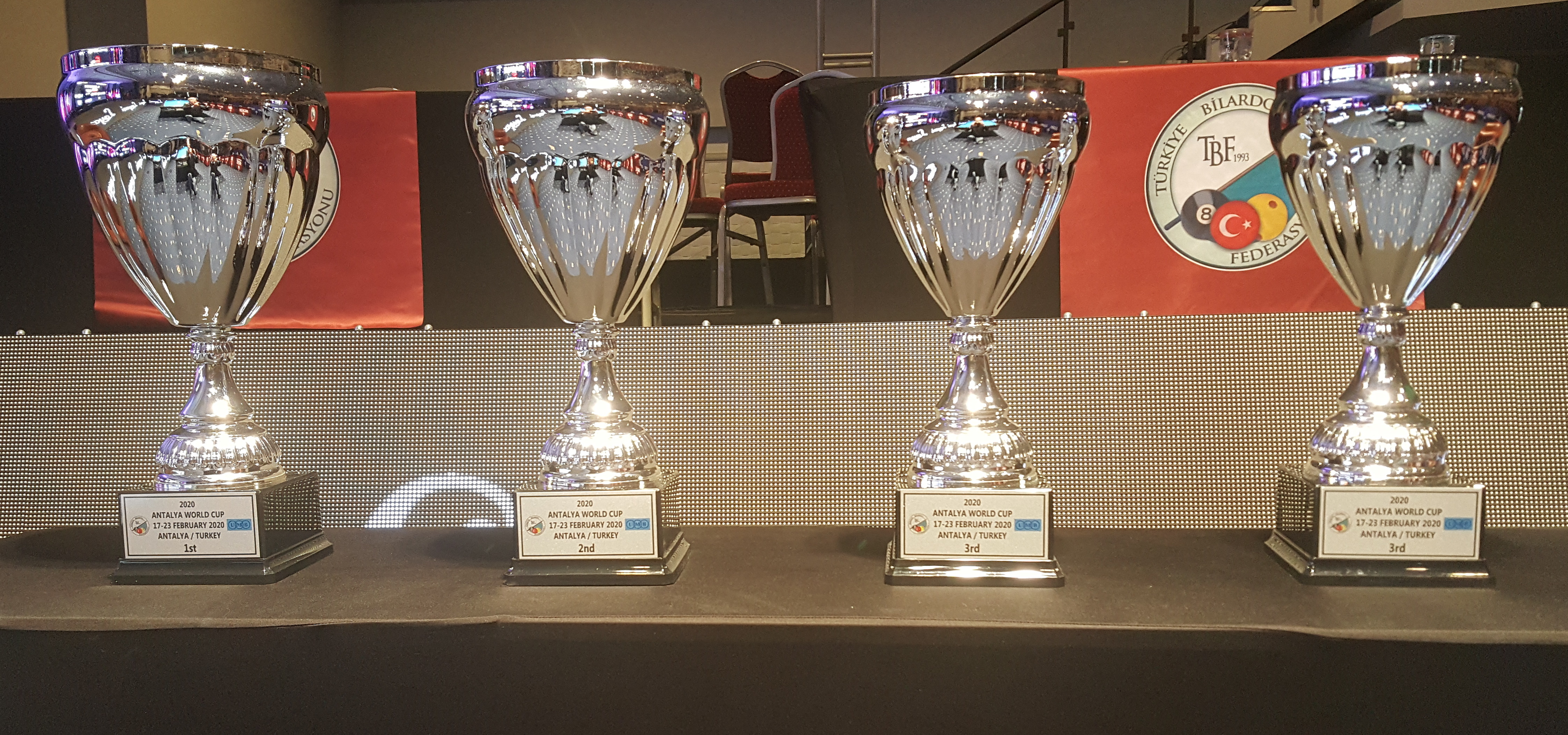 Pokale des Dreiband-Weltcup 2020/1